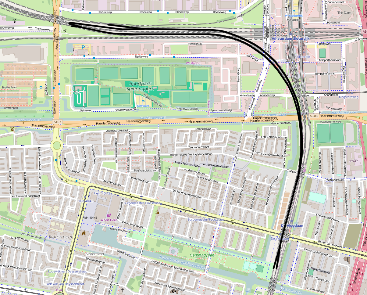 Hemboog